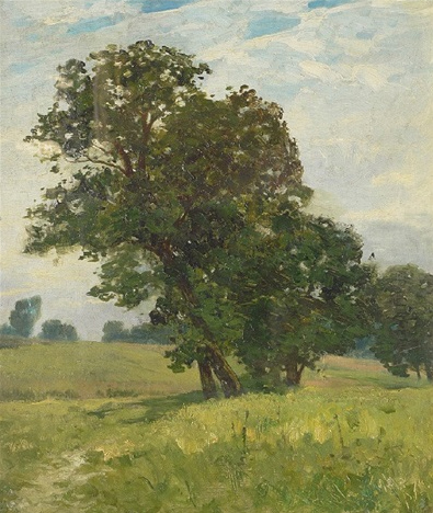 Waldlichtung